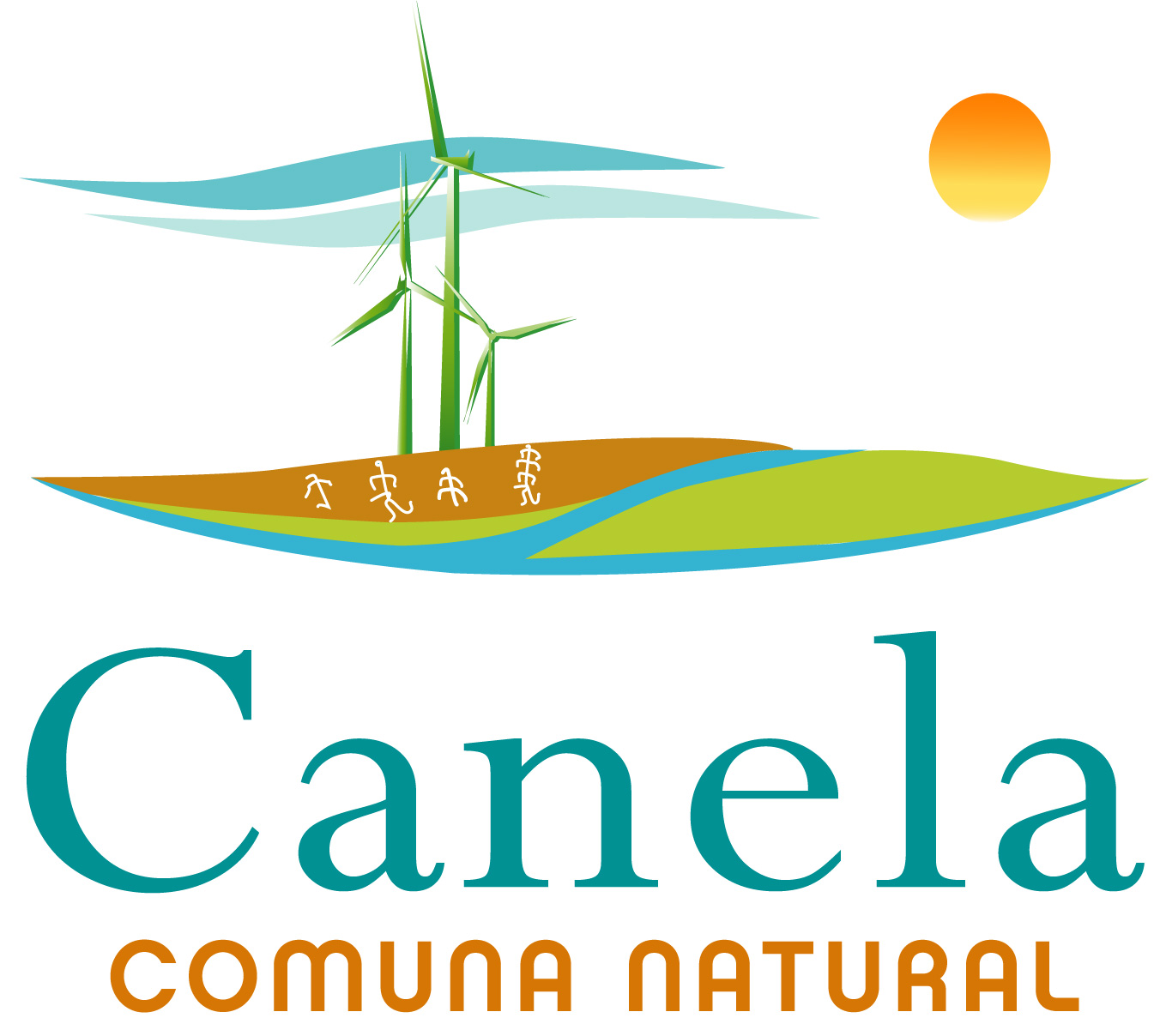 Logo Canela